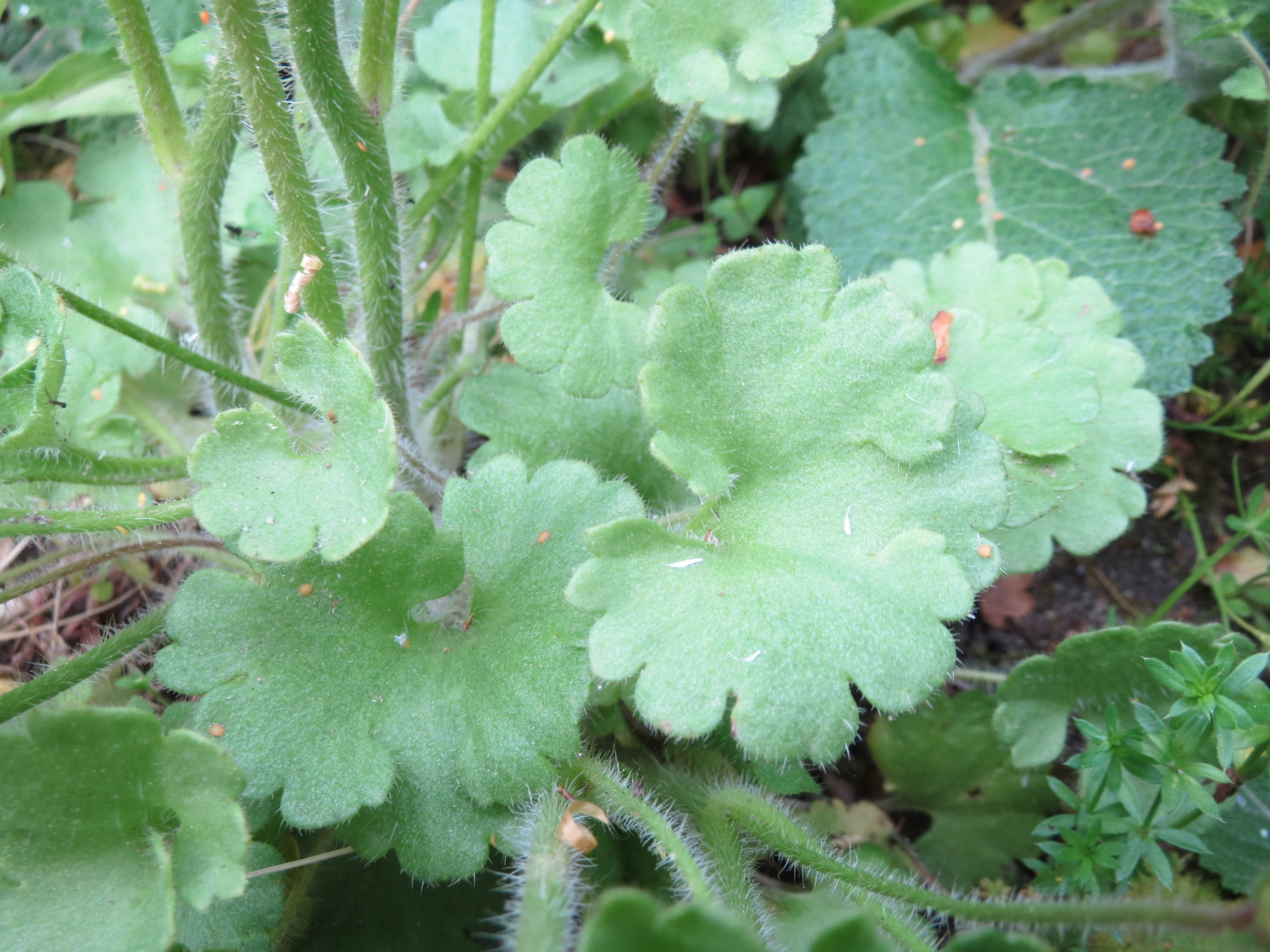 Knöllchen-Steinbrech (Saxifraga granulata) in Hockenheim